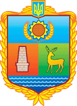 Герб Нововоронцовського району